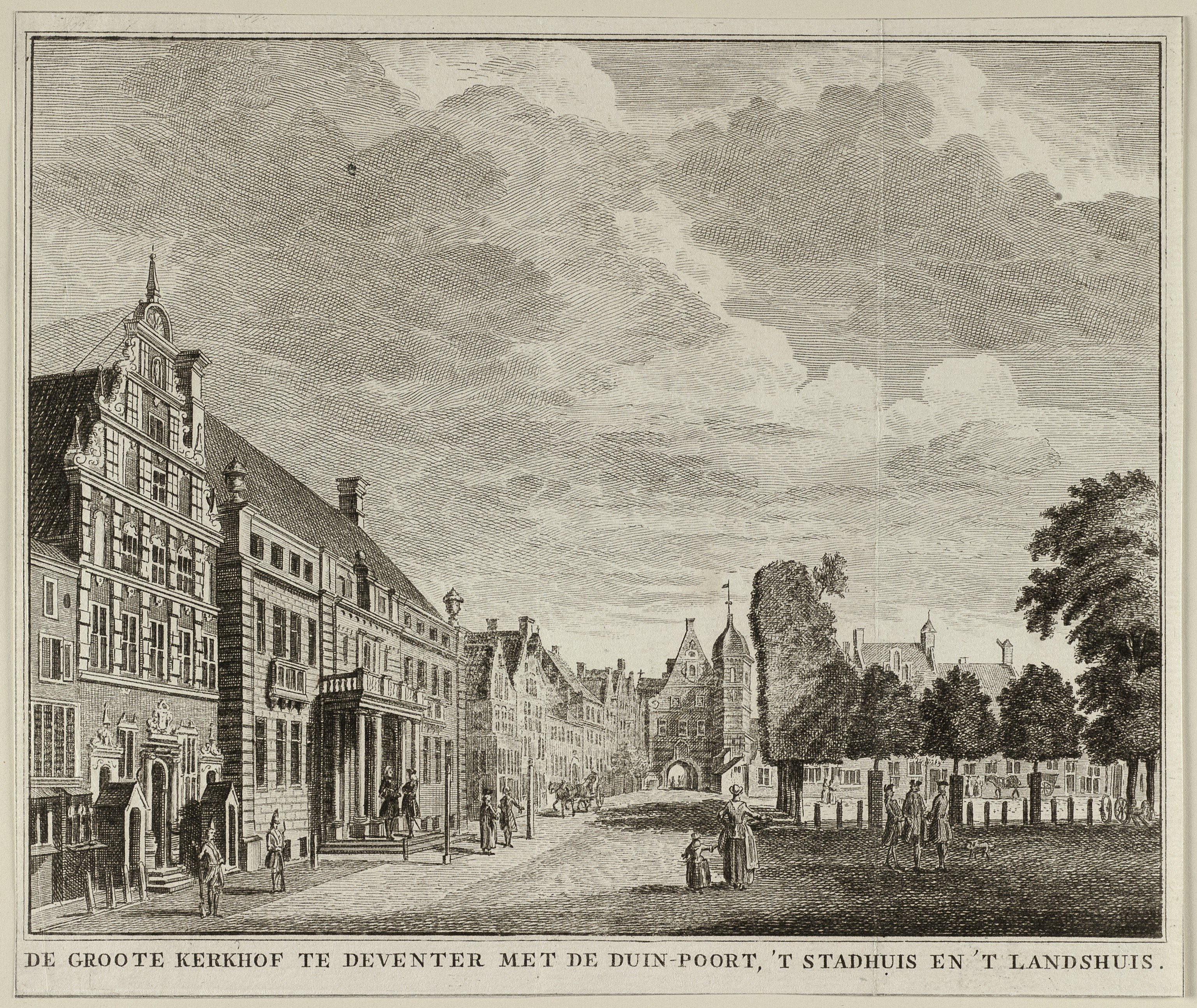 CollectieVoorhelm SchneevoogtInventarisnummerNL-HlmNHA_1477_53012002BeschrijvingGezicht op De Groote Kerkhof te Deventer met de Duin-Poort, 't stadhuis en 't landshuis.FotonummerNL-HlmNHA_1477_53012002DocumenttypeTopografische prenten, tekeningen en foto'sVervaardigerSpilman, Hendrik (1721-1784), toegeschreven aan LandNederland ProvincieOverijssel PlaatsDeventer Begindatum1742Einddatum1784TechniekGrafiek Drukwerk Trefwoordenstadspoorten, stadhuizen